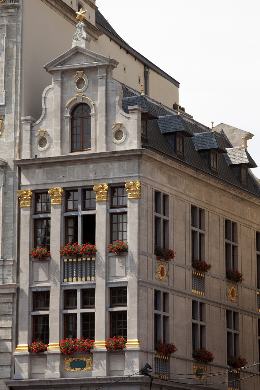 De Sterre